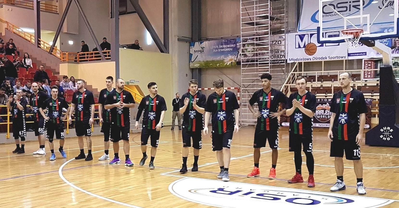 GKS Tychy w Stargardzie (16.12.2018)